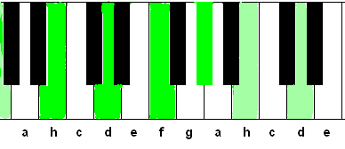 Der Isointervallakkord h d f as auf der Keybordtastatur